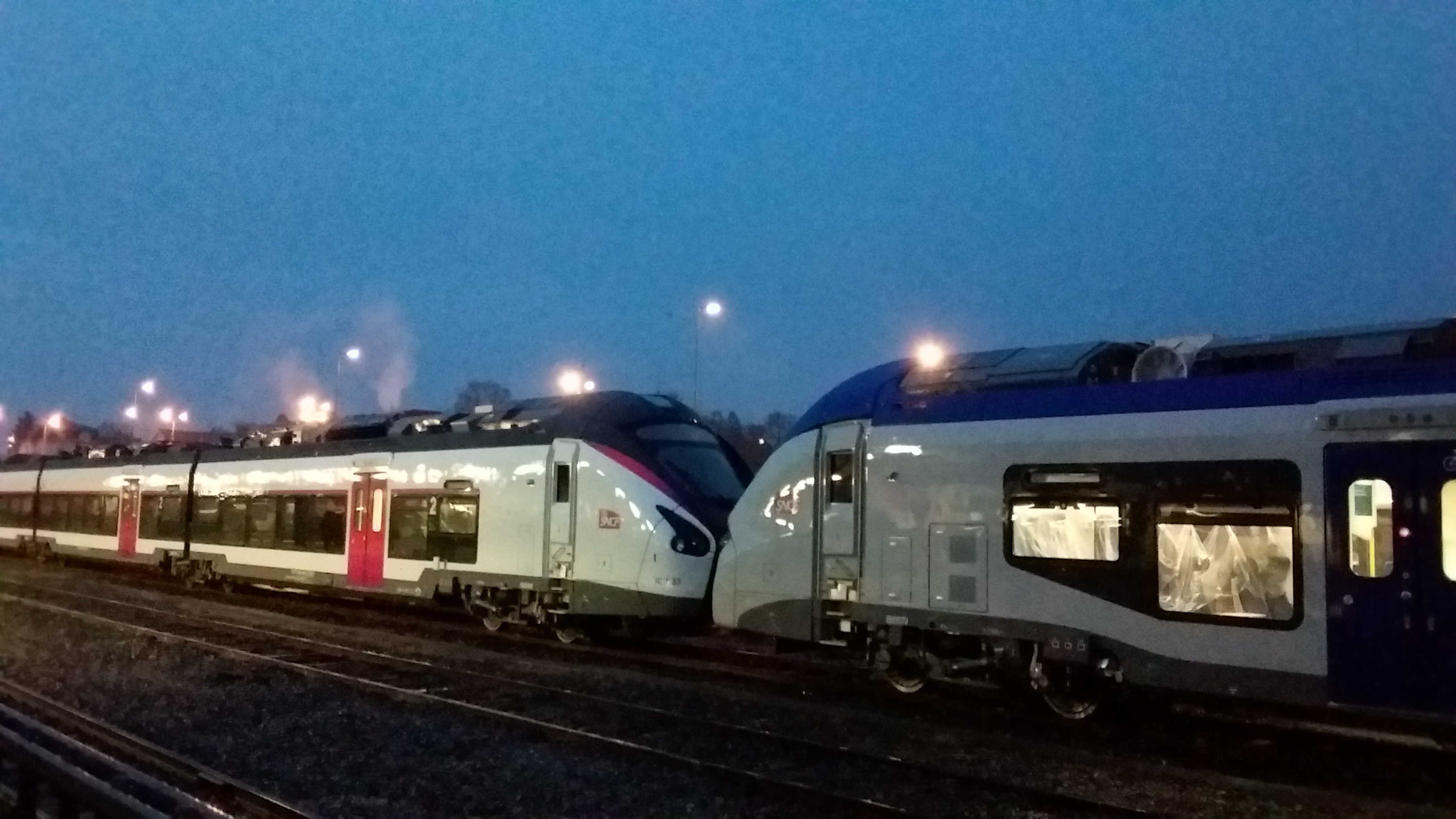 Coradia Liner tracté par un Régiolis en gare de Haguenau.